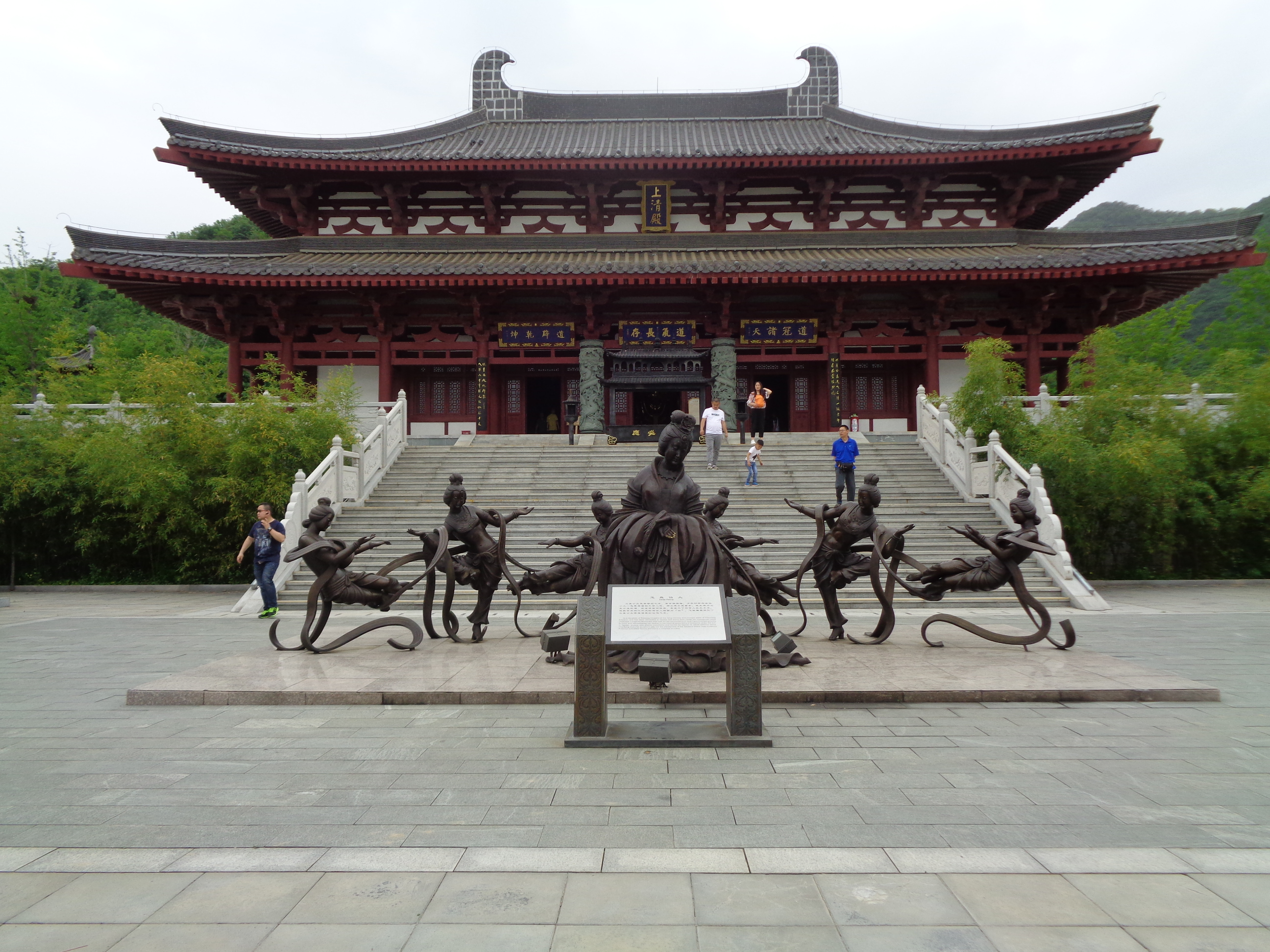 西安市周至县楼观台西约3.5公里就峪口